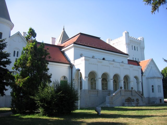 Дворац Фантаст у атару Бечеја